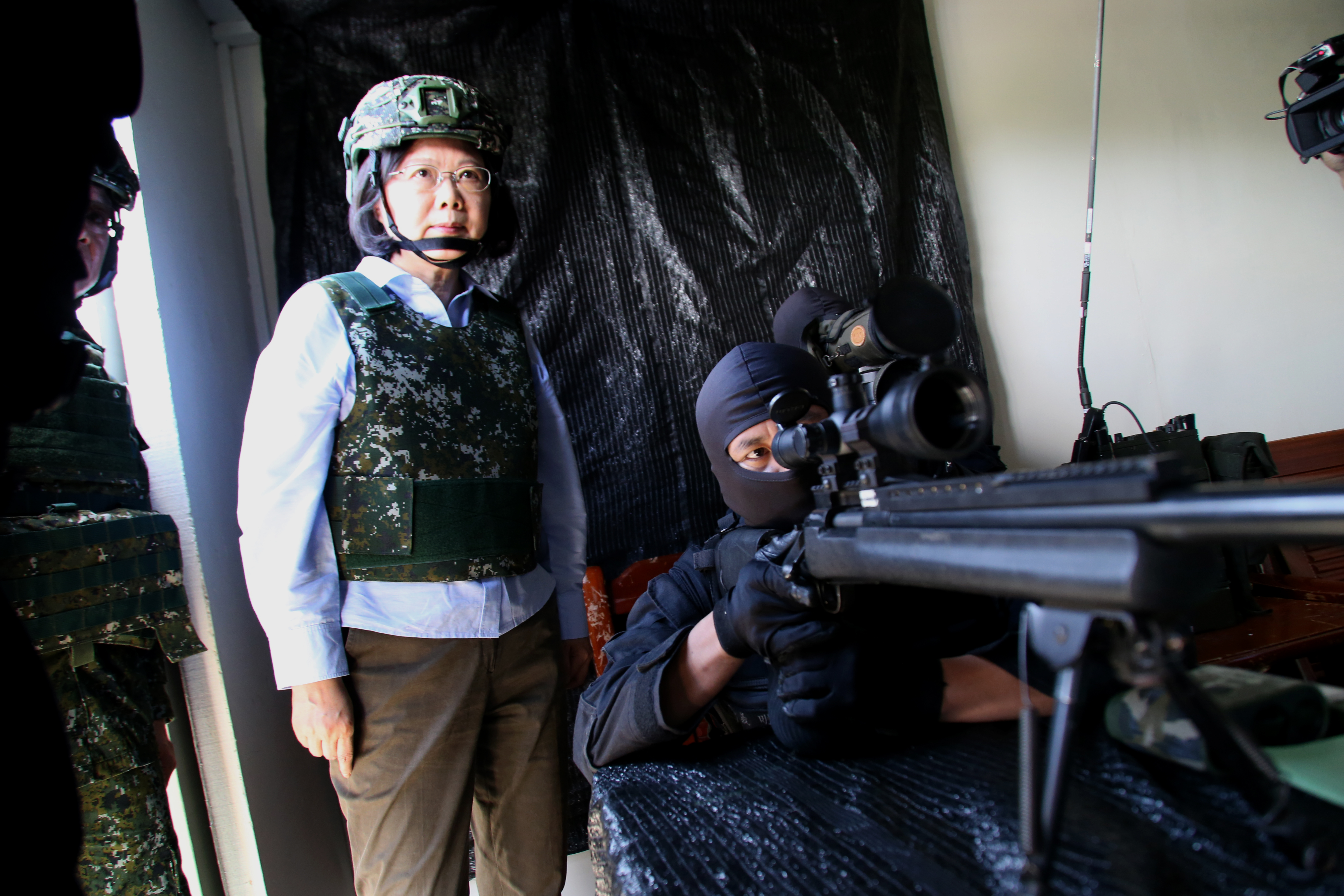 文言: 07.20 總統視導陸軍航特部高空特種勤務中隊，以及各項戰技操演